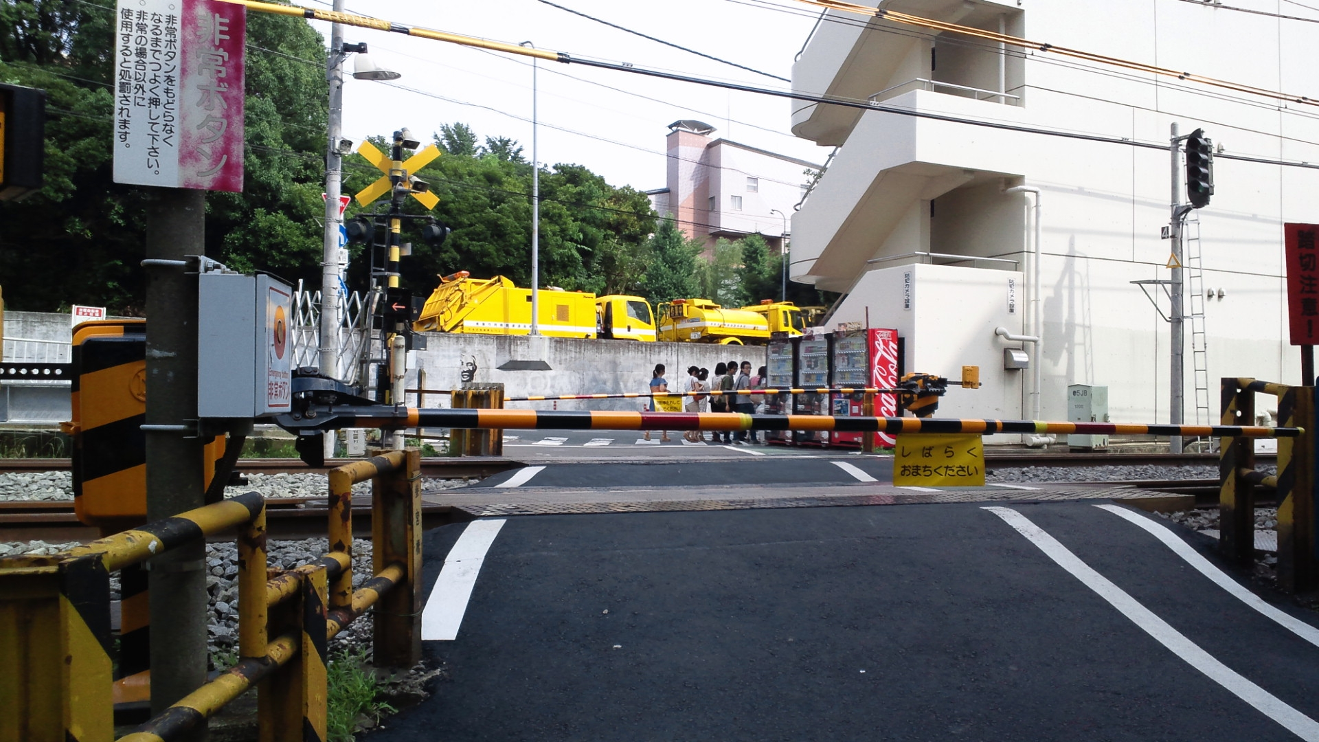 秒速5センチメートル・・・